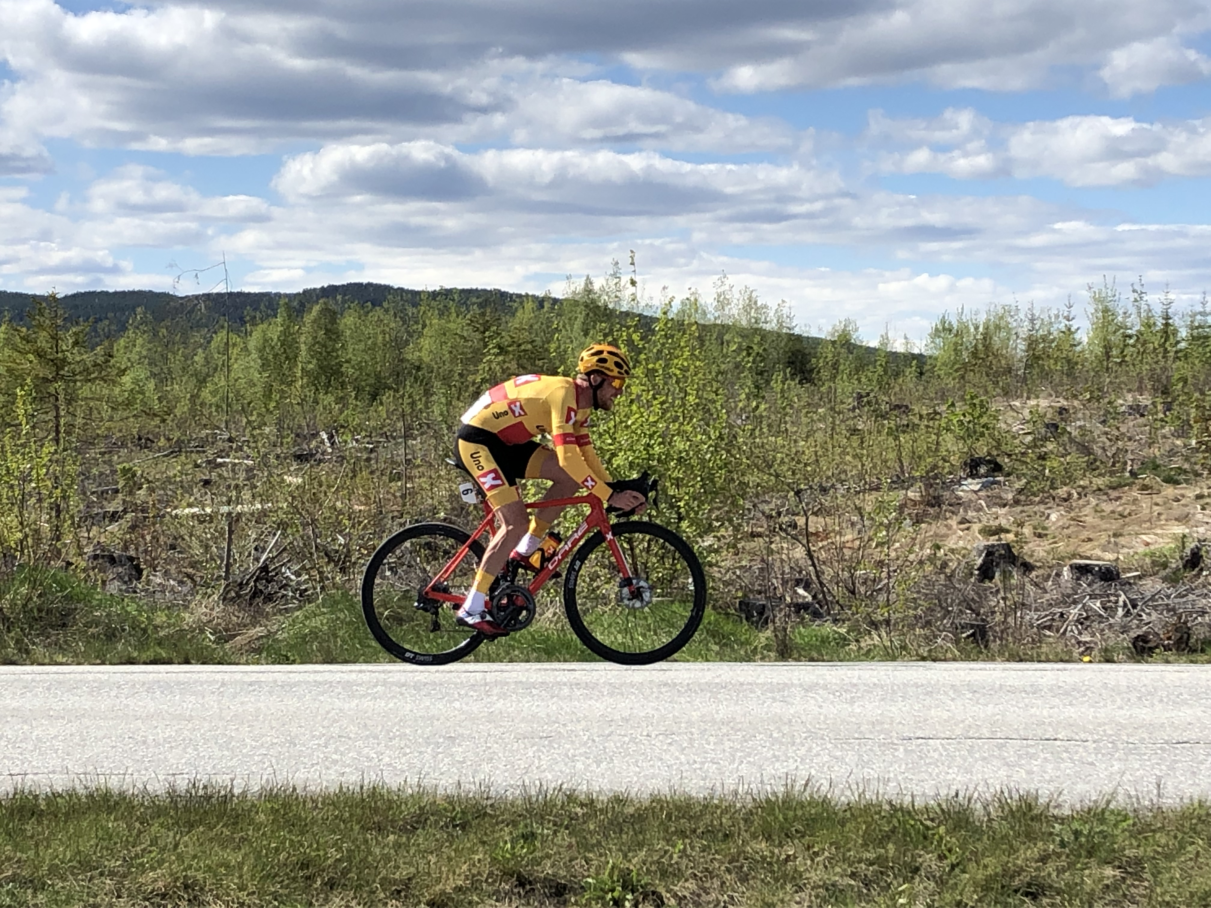 Ringerike Grand Prix 2019 - Bib 6 Kristoffer Skjerping. Resultat: Vinner 2019.